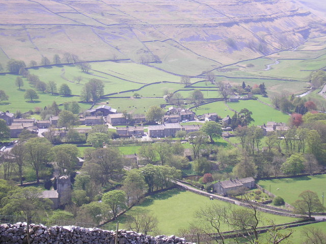 Arncliffe